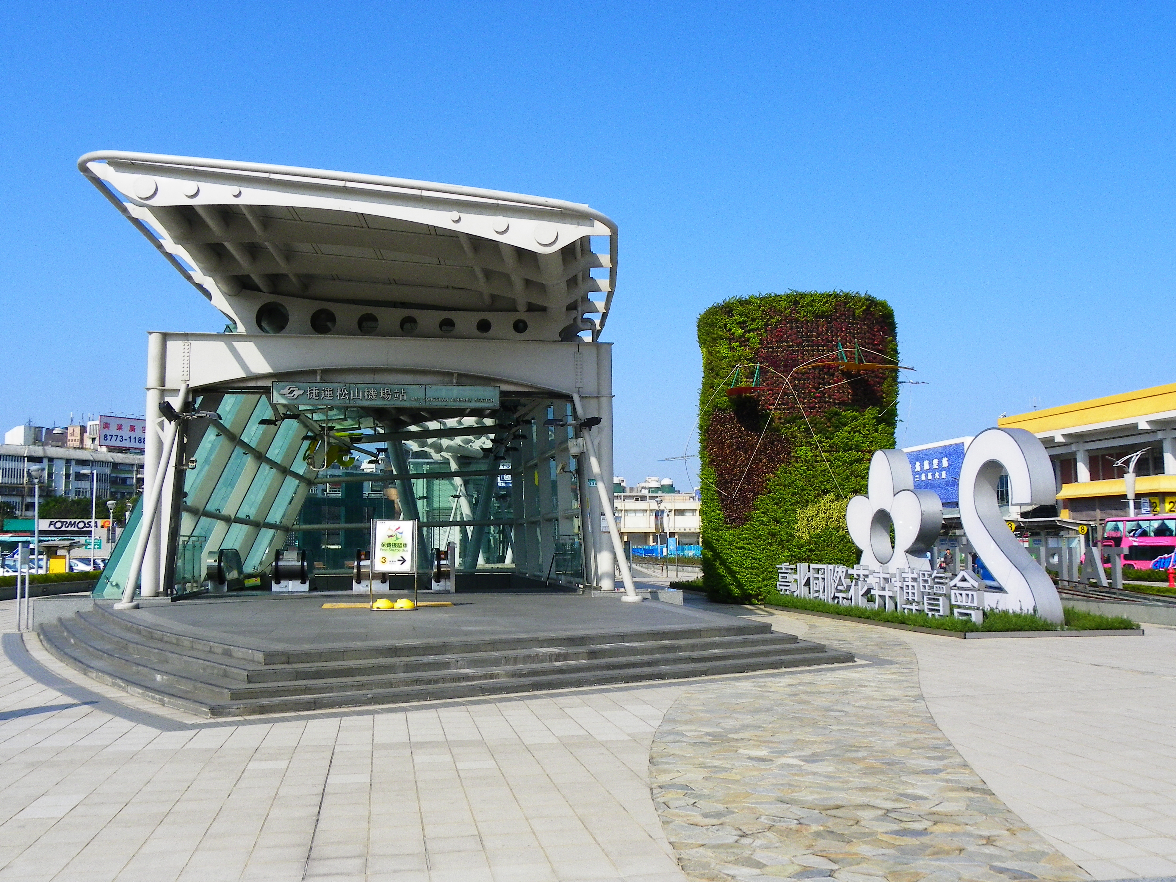 臺北捷運內湖線松山機場站3號入口前與2010臺北國際花卉博覽會裝飾。